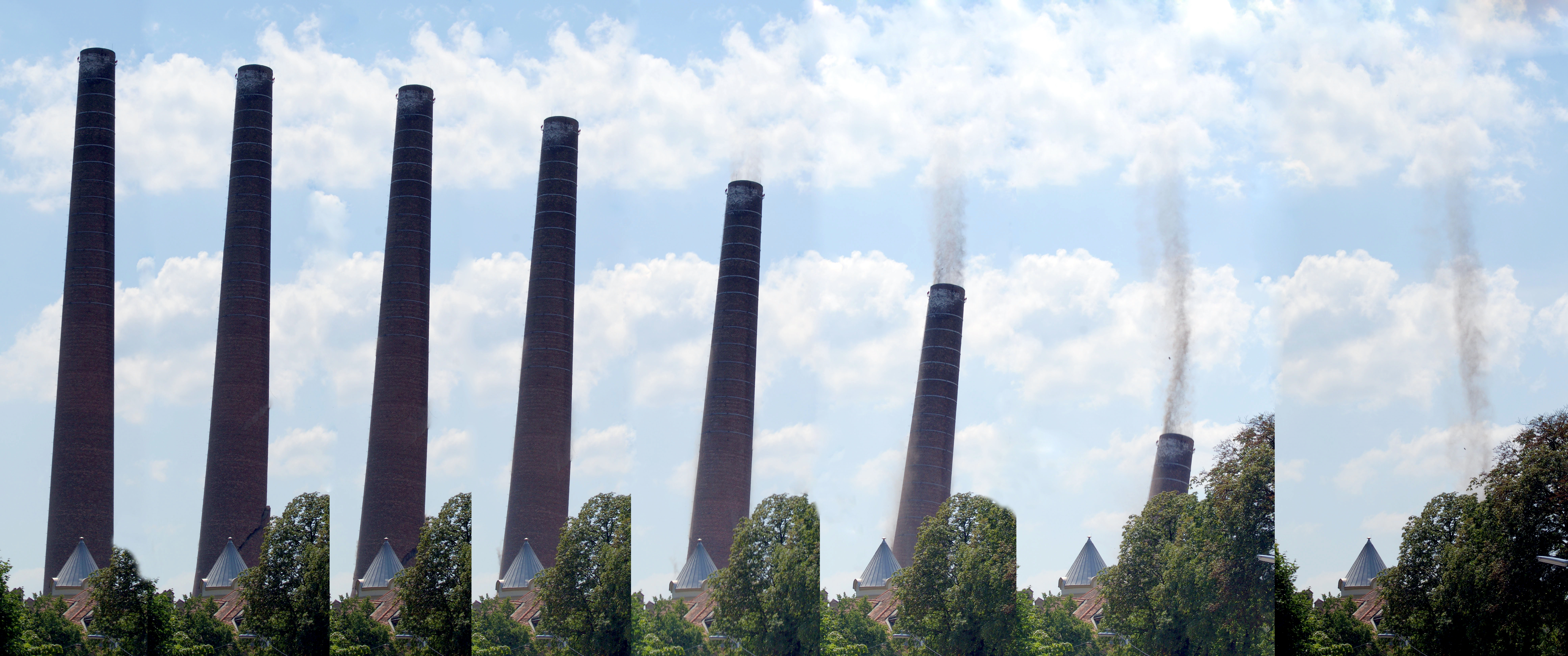 Die Sprengung des Schlots der Glanzstoff in St. Pölten